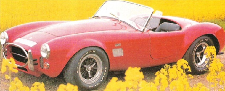 Bildbeschreibung: AC Cobra 427 in des Moines Quelle: A.Wart (Benutzer; Enthusiast, eigenes Foto) Fotograf:A.Wart Datum: 09.08.1997 Sonstiges: JPEG-Bild, Abmessungen;760 x 309, 64kb Lizens: Ich stimme der Public-Domain Lizens zu und veröffentliche das Bild.